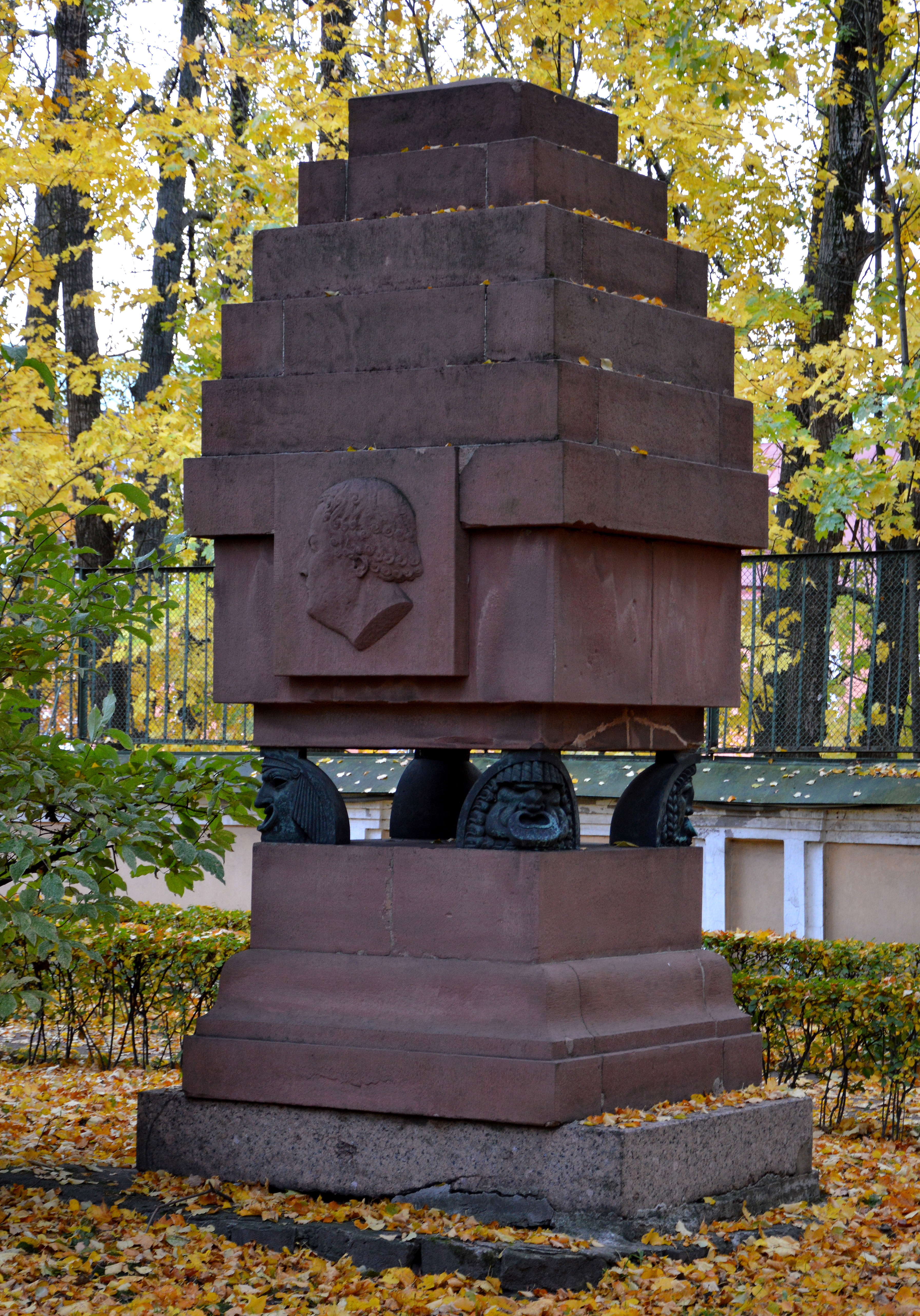 Tartak, Joachim Grab in Sankt Petersburg